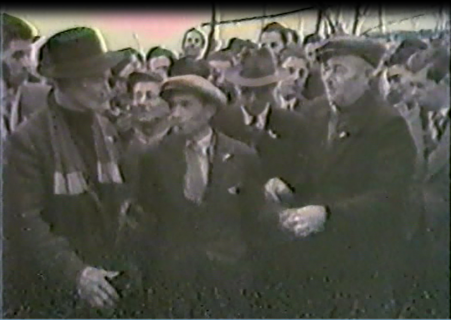 Consegna delle chiavi della nuova casa a Tile nel 1954.